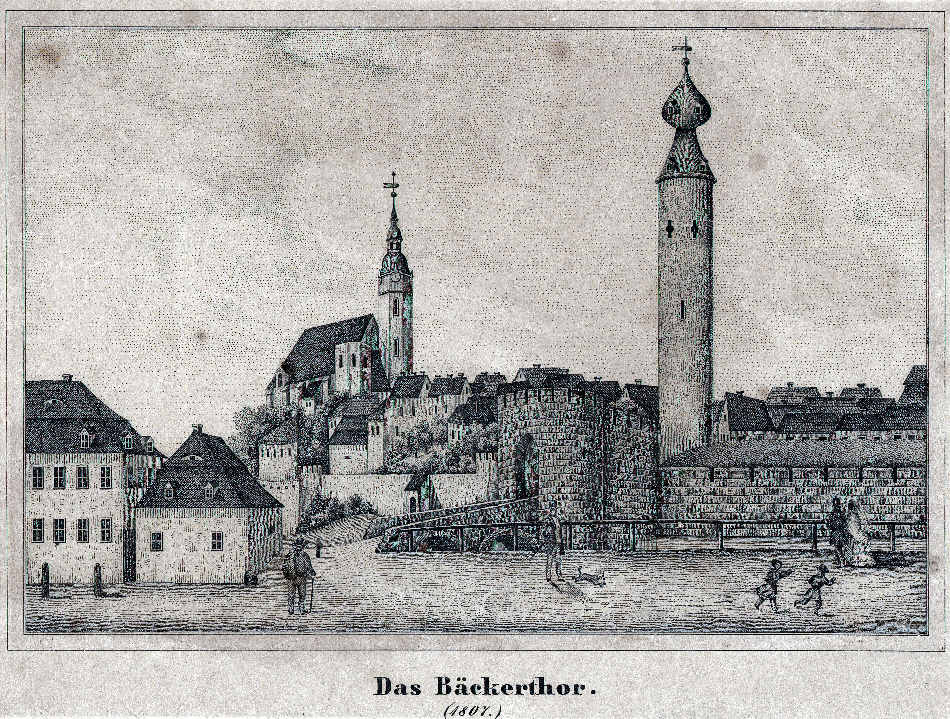 Dieser Stich zeigt das ehemalige Bäckertor in Torgau mit der Marienkirche im Jahr 1807. Da keine weitere Beschriftung auf dem antiken Blatt vorhanden ist, muß das Blatt nicht zwangsläufig 1807 entstanden sein, obgleich es eine gewisse Wahrscheinlichkeit gibt, dass die Darstellung zum Anlaß der Abbruchs der Anlage entstanden sein könnte. Definitiv stammt das Blatt jedenfalls aus der ersten Hälfte des 19. Jahrhunderts.